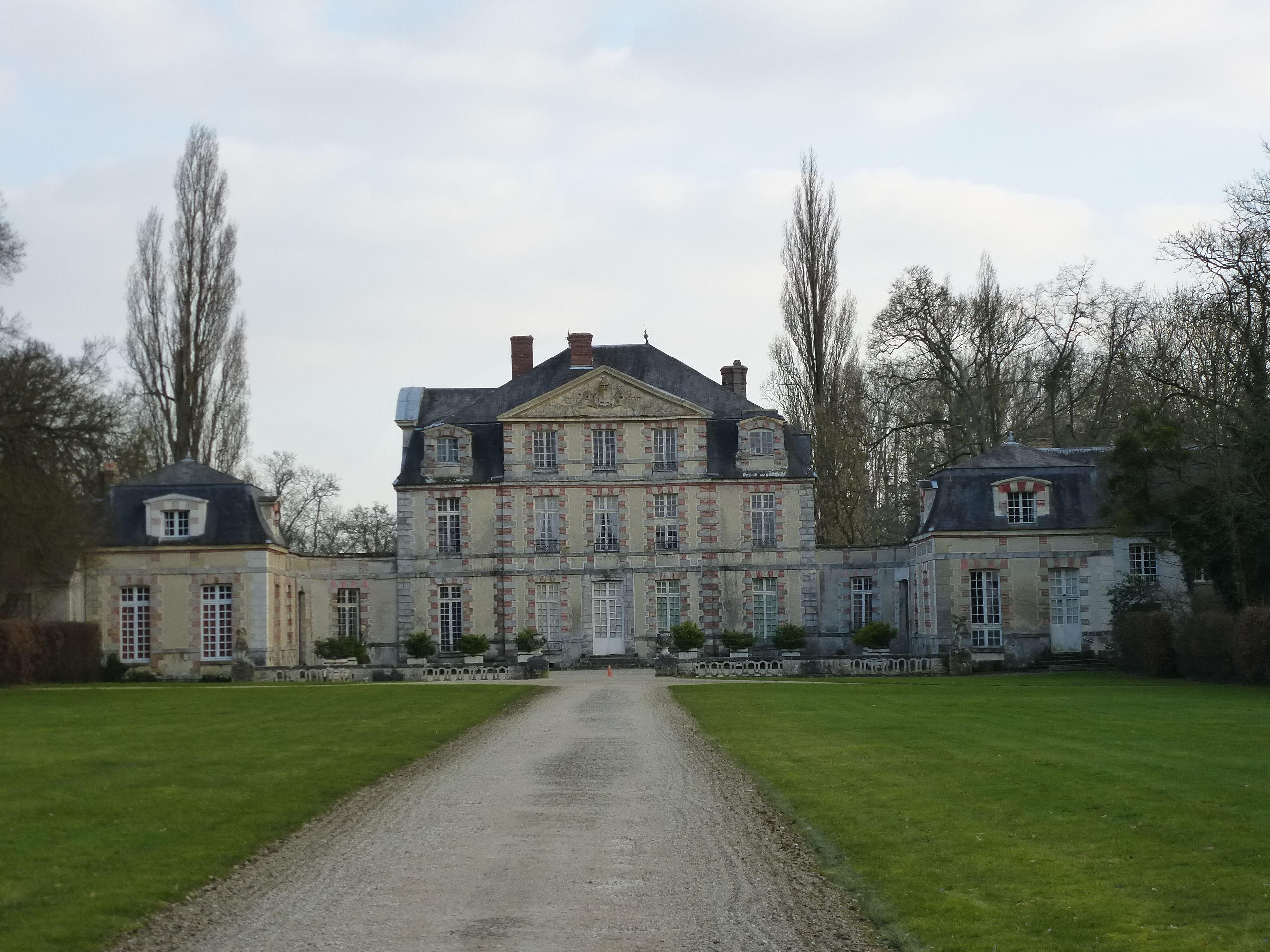 Le château de Nandy. (département de la Seine et Marne, région Île-de-France).